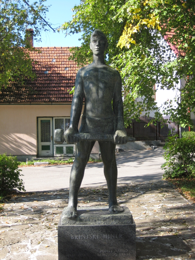 Brinjski miner, Brinje, Croatia